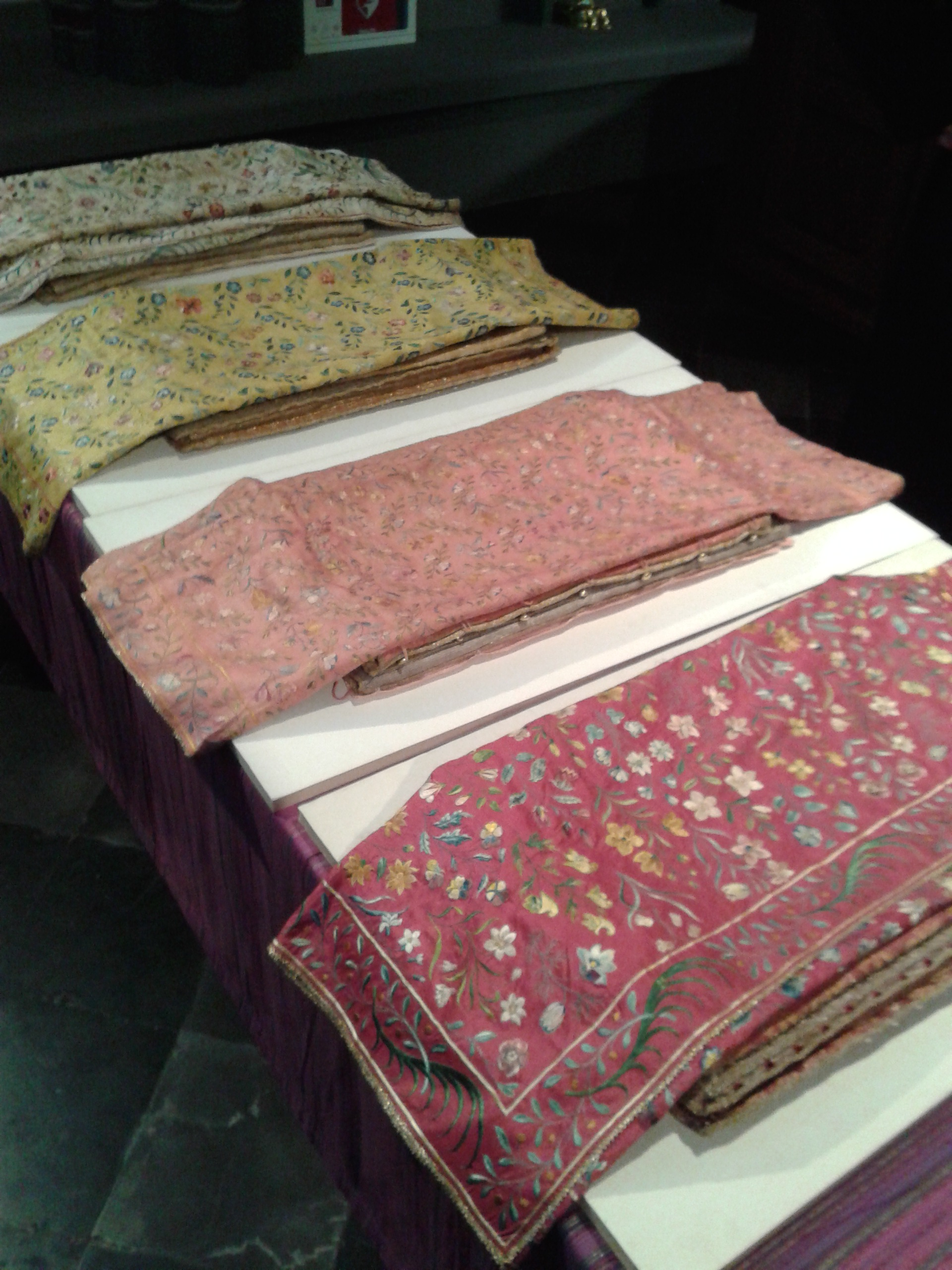 Schmucktücher, sowie die inneren und äußeren Bursen der Aachener Heiligtümer. Von links oben nach rechts unten: Kleid Mariens, Windeln Jesu, Enthauptungstuch des Johannes und Lendentuch Jesu. Aufnahme in der Domsakristei des Aachener Doms anlässlich der Erhebungsfeier der Heiligtumsfahrt 2014.